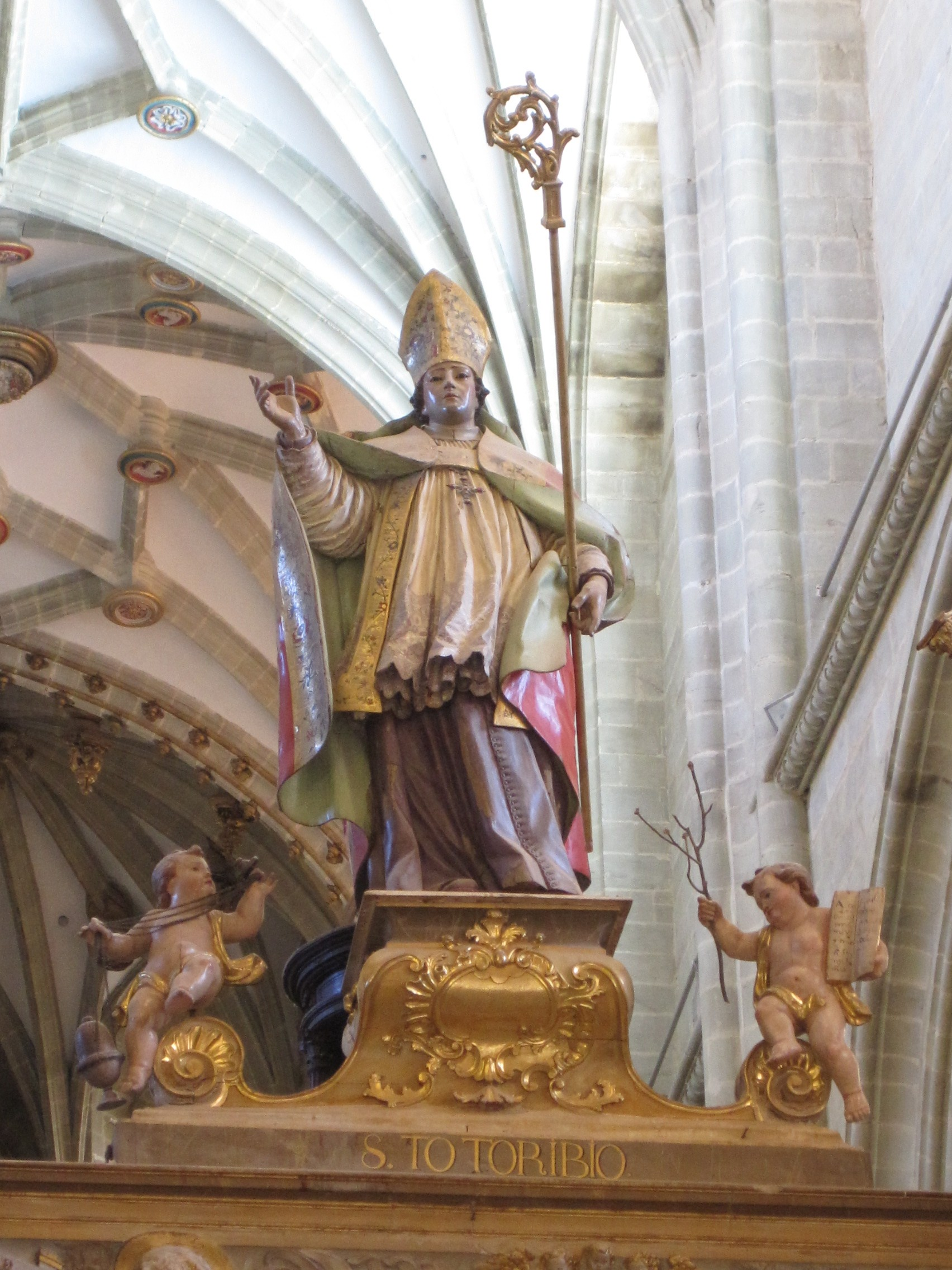 Estatua de Santo Toribio, en la catedral de Astorga (España).